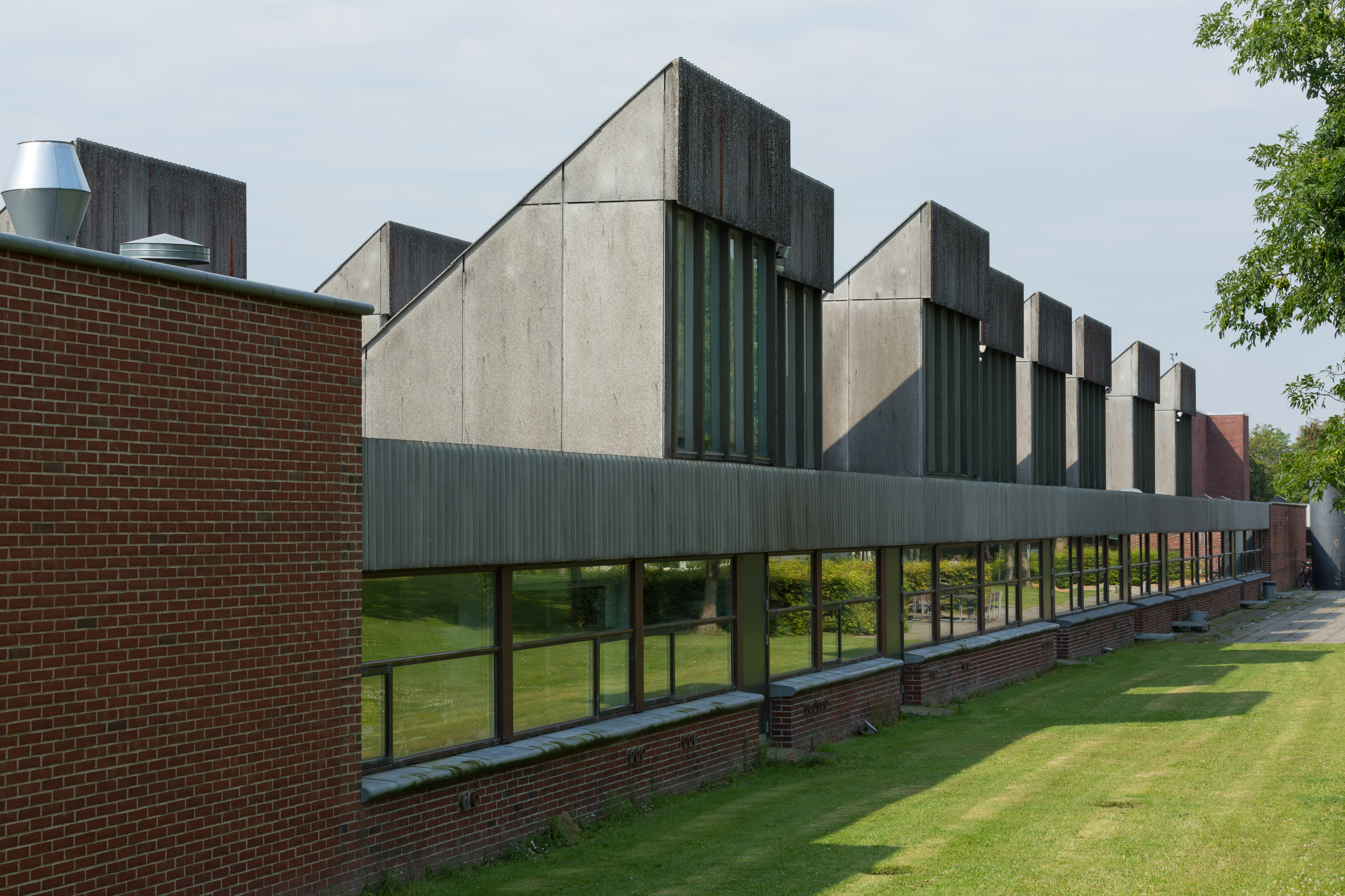 Langkær Gymnasiums ovenlysvinduer nordsiden